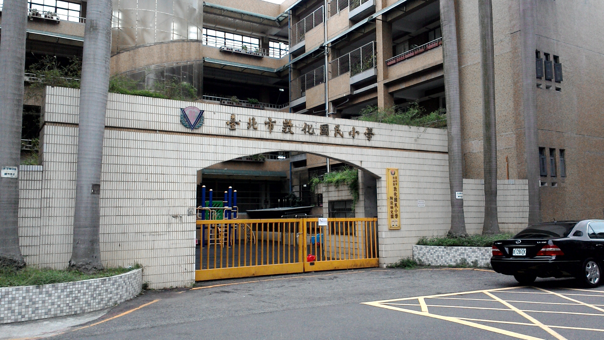 臺北市松山區敦化國民小學後門。